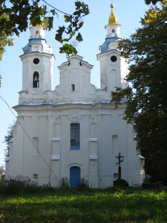 Вольна. Царква